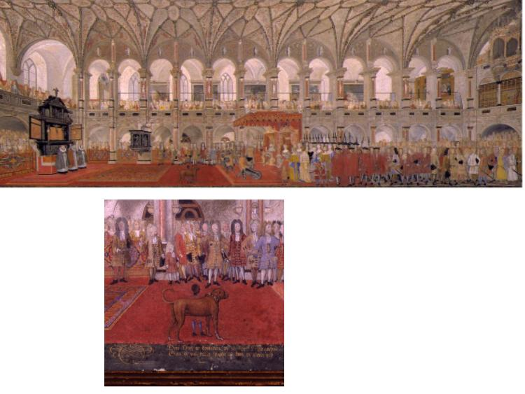 Frederik IV’s kroning 25. august 1699 i Frederiksborg Slotskirke. Malet af 15. april år 1706. Maleriet er ikke stort (29,7 x 81,7 cm) men meget detaljeret i gouache-teknik. Kom til Rosenborg Slot i år 1838 fra Frederiksborg Slot (inv.nr. 8-23). Mellem de to tæpper, alter og trone, står foran Kongen en negerdreng med Den danske Hund, der hed Sultan.